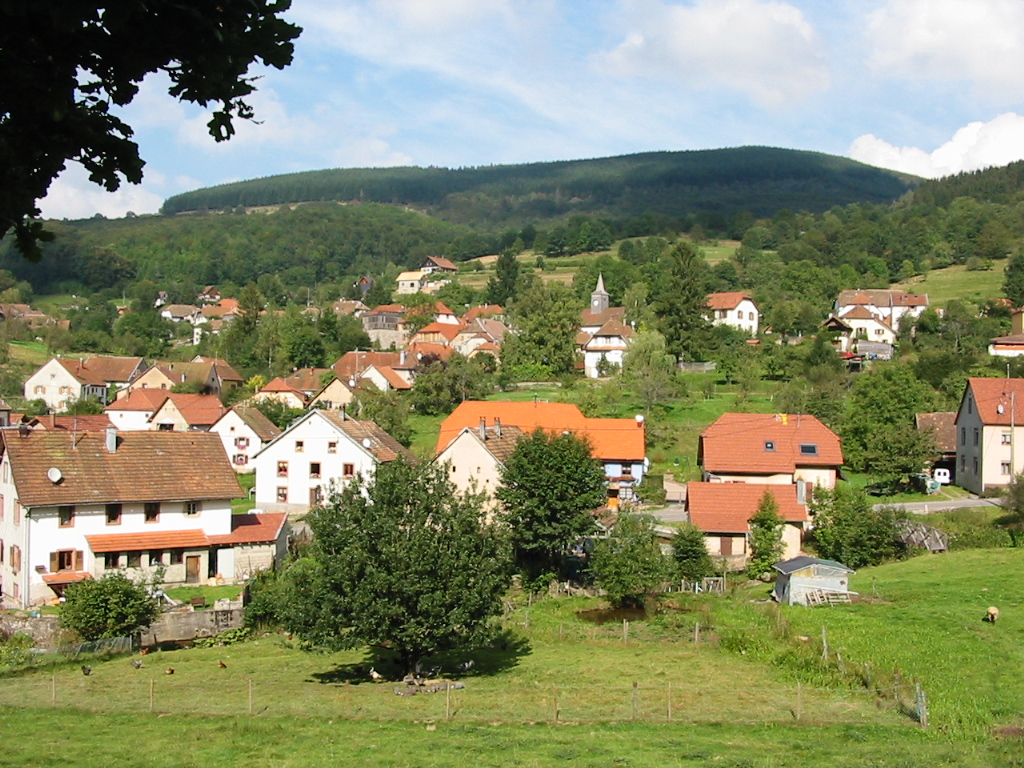 Waldersbach, commune du bas-Rhin